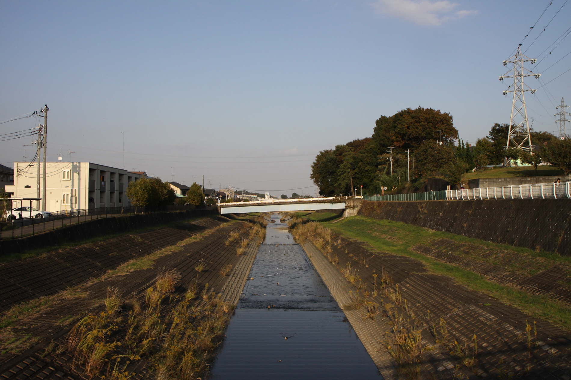 大栗川